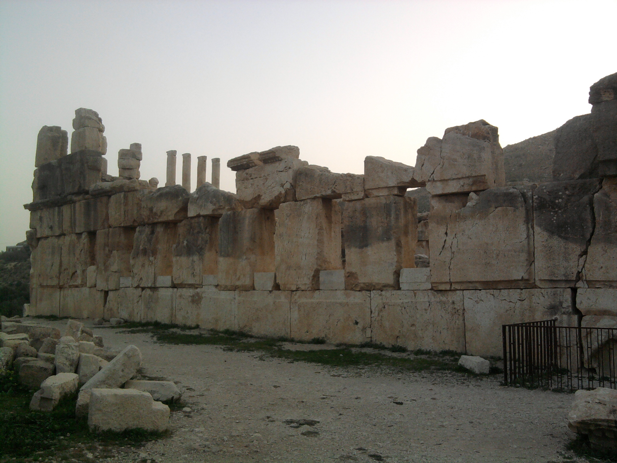 قصر عراق الامير